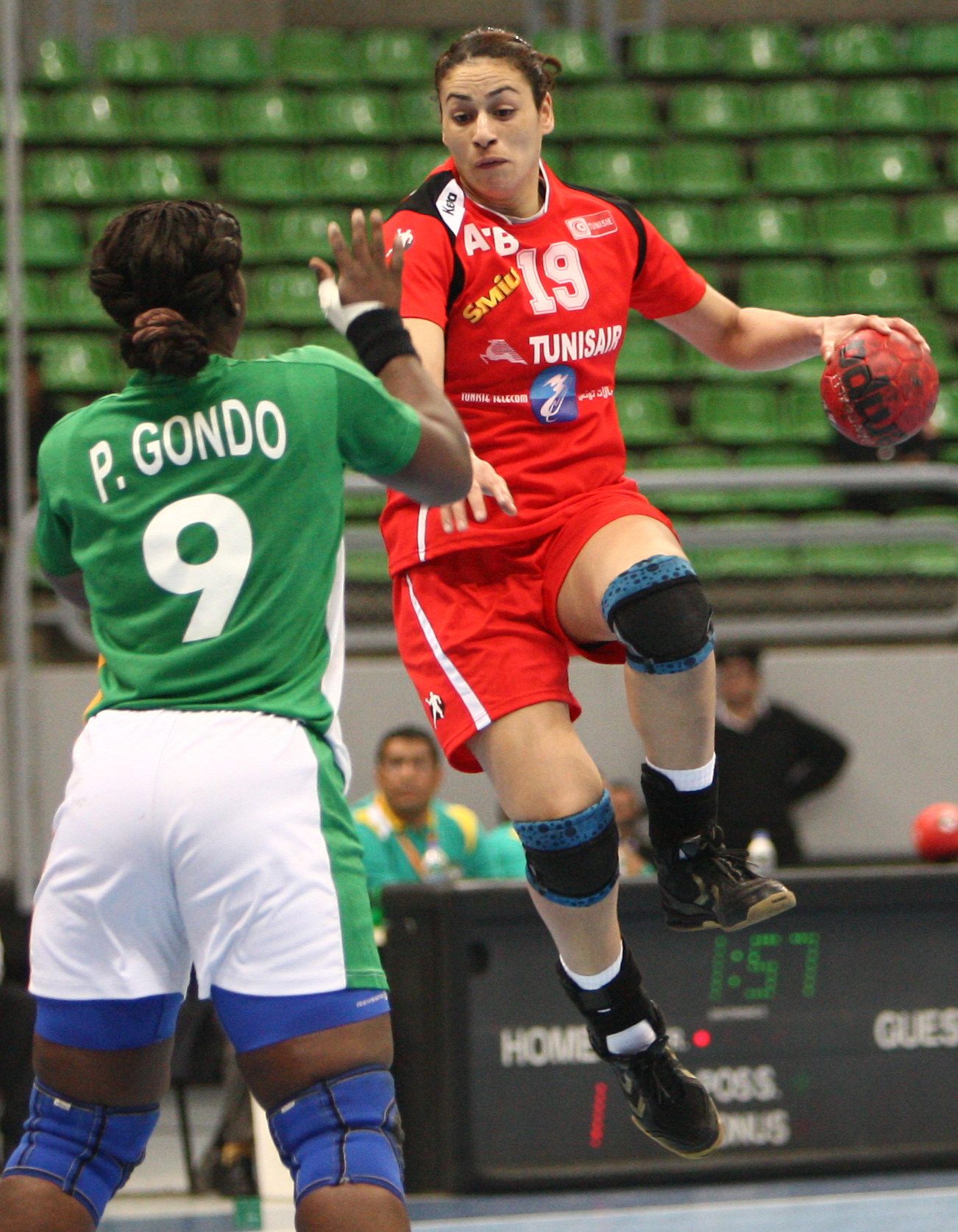 Rafika Marzouk en action lors de la dernière CAN 2010